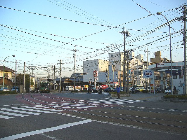 京福電気鉄道（嵐電） 西大路三条駅（撮影当時は三条口駅）嵐山方面のりば（ホーム） 西大路三条交差点から南東望 2006年3月 Bakkai撮影